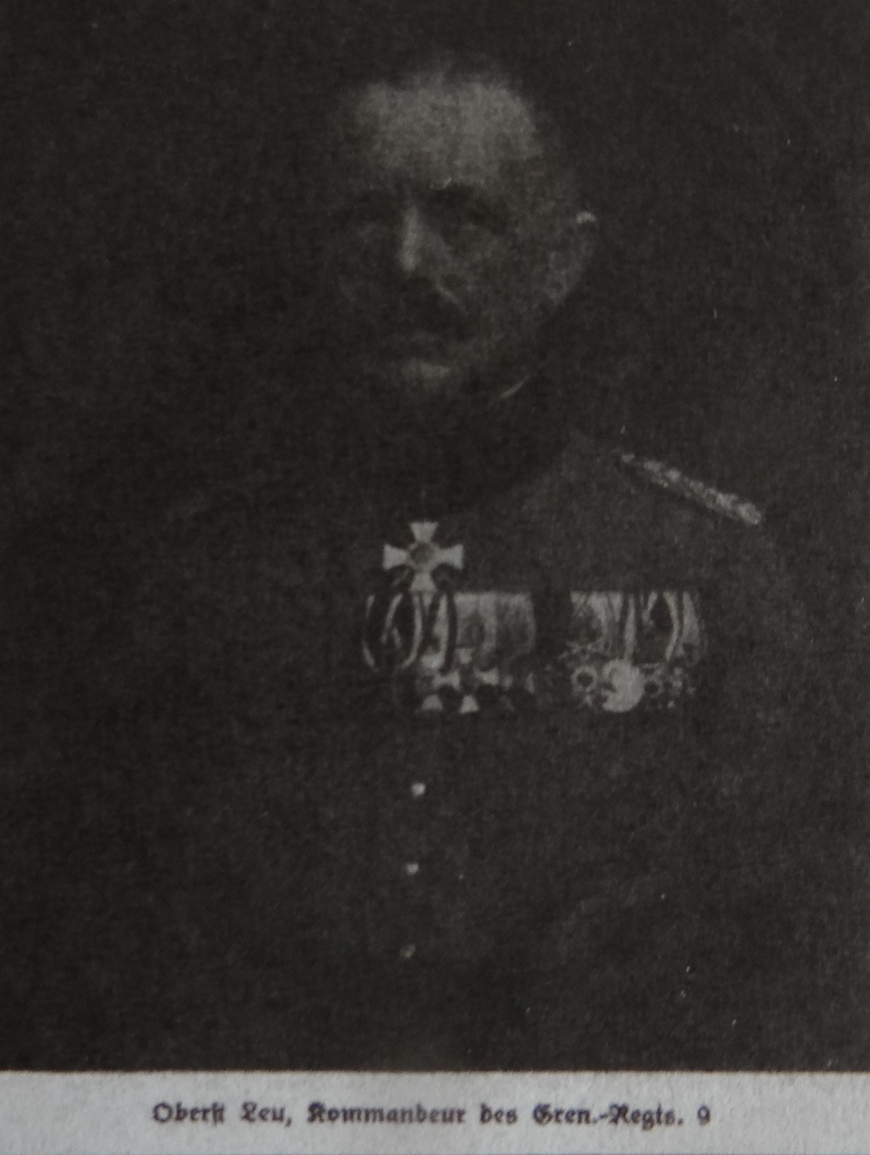 Dowódca 9 Pułku Grenadierów płk Leu w latach 1914-1915